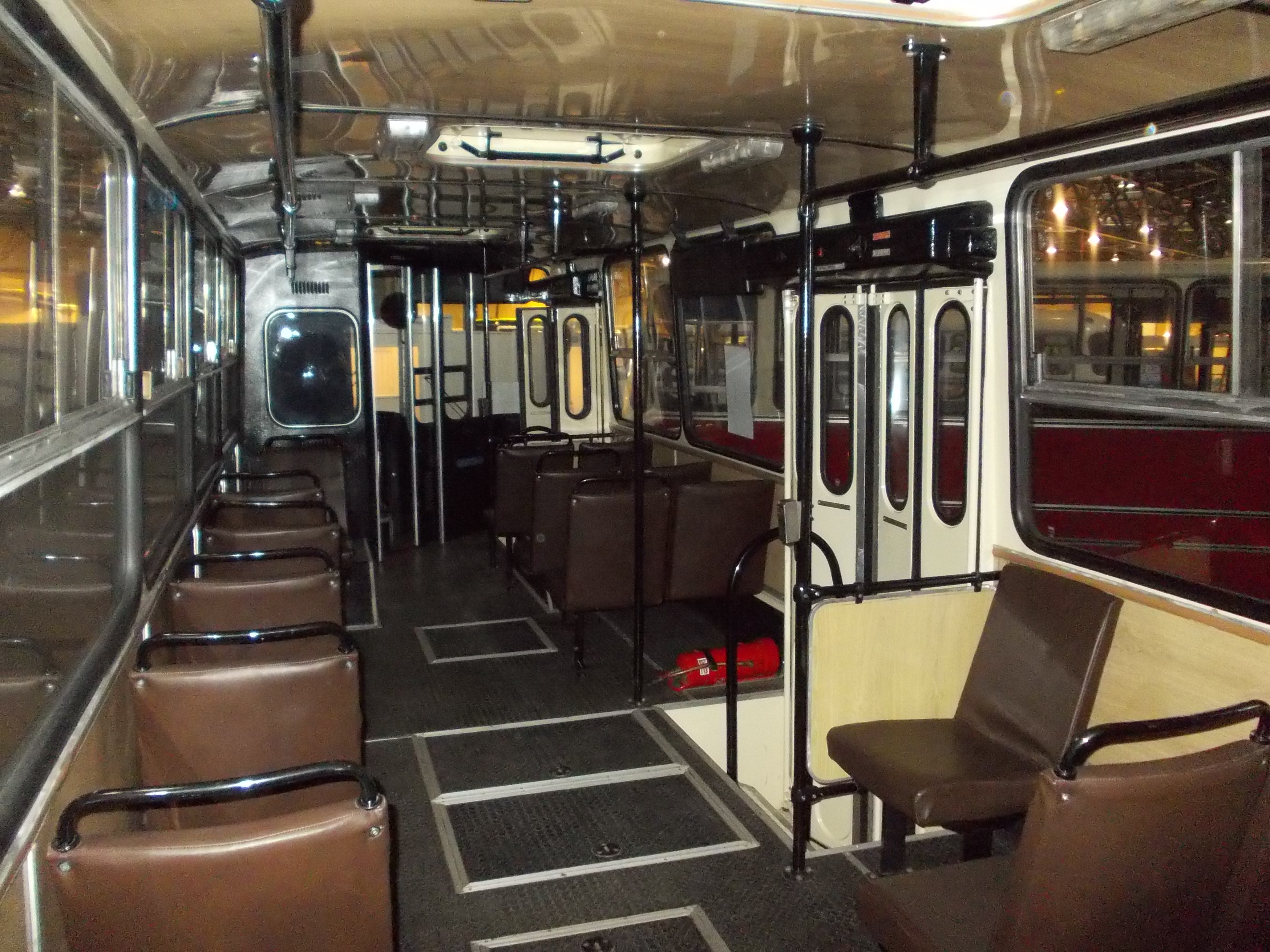 Ikarus 260 (rok produkcji 1985) podczas ekspozycji historycznej towarzyszącej targom SilesiaKOMUNIKACJA 2014 w Sosnowcu.